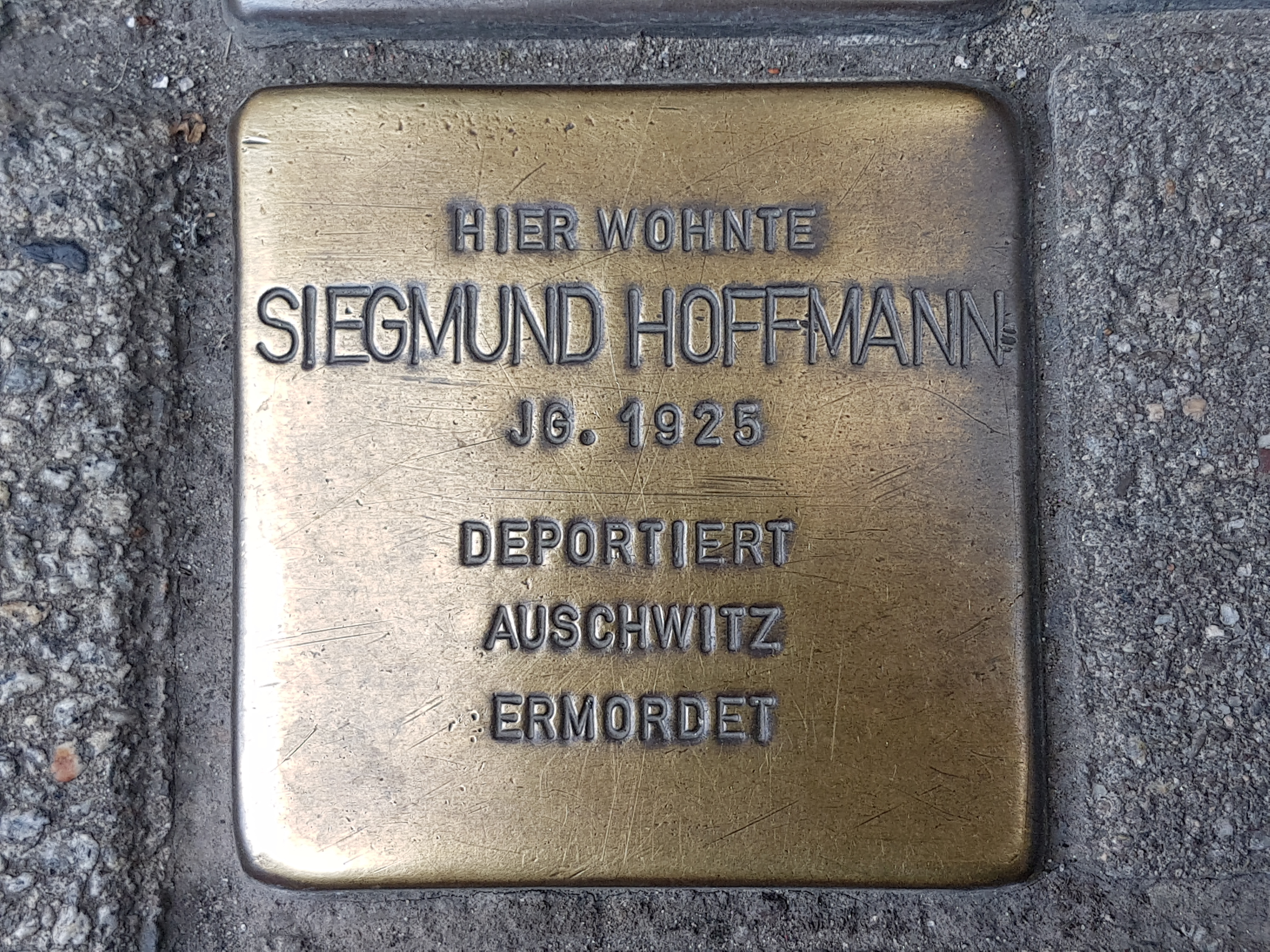 Siegmund Hoffmann Stolperstein Duisburg